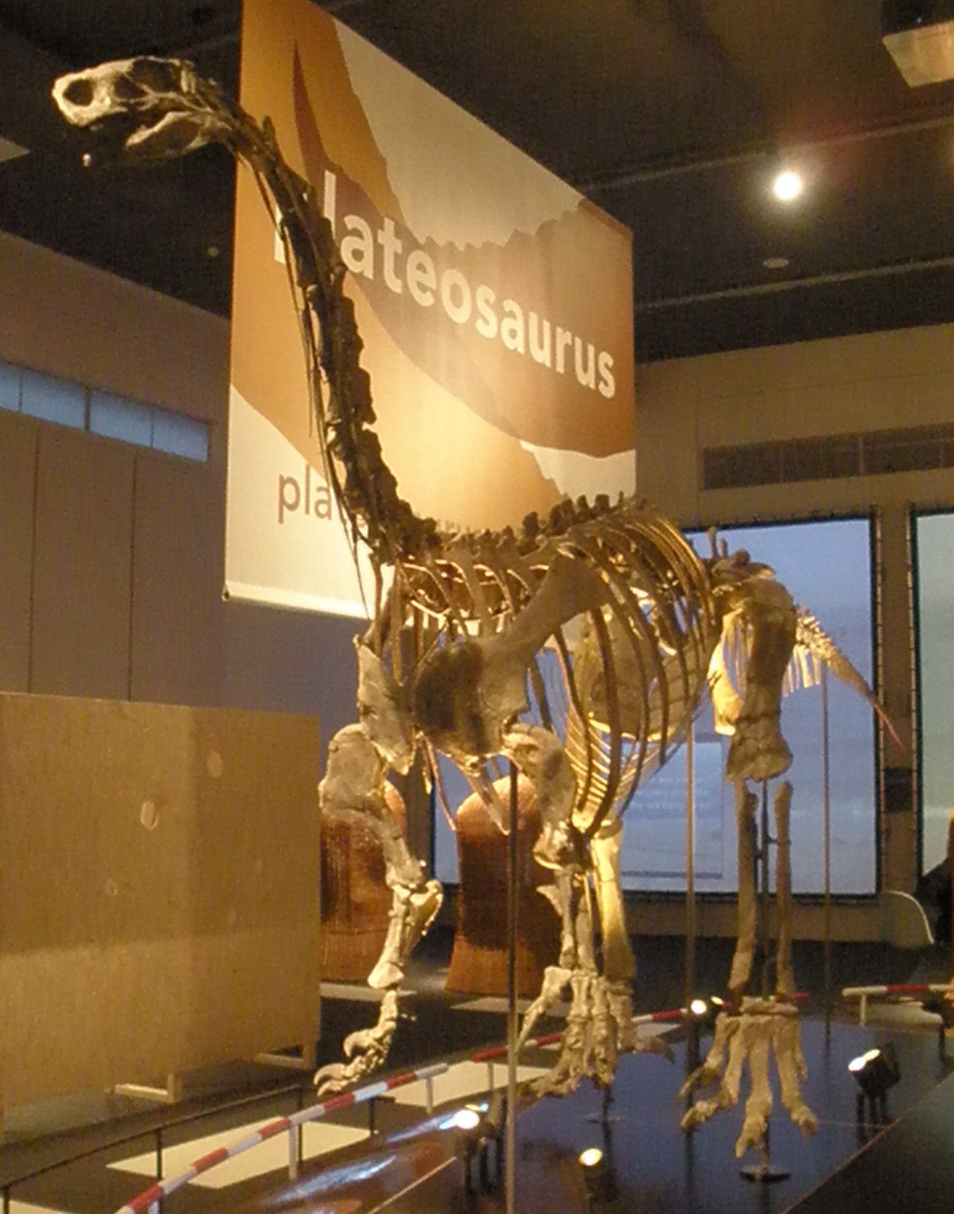 Fossil of Plateosaurus, an extinct prosauropod- Took the photo at Naturalis museum, Leiden